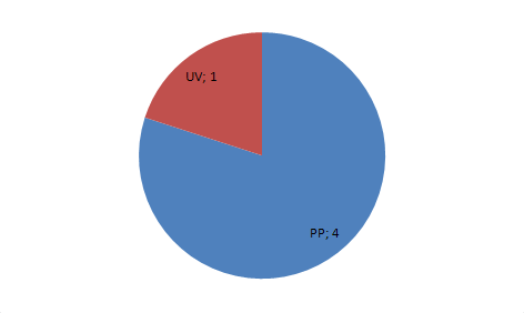 Número de concejales de las elecciones locales de 1999 en Segart